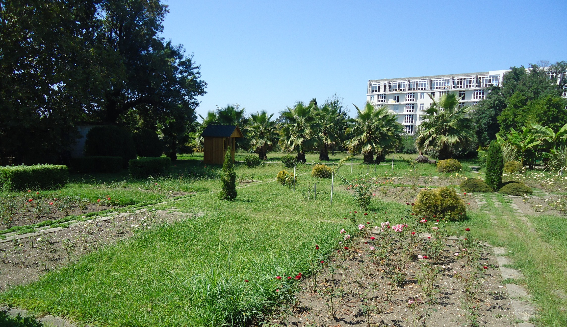 Парк Южные культуры в Адлере